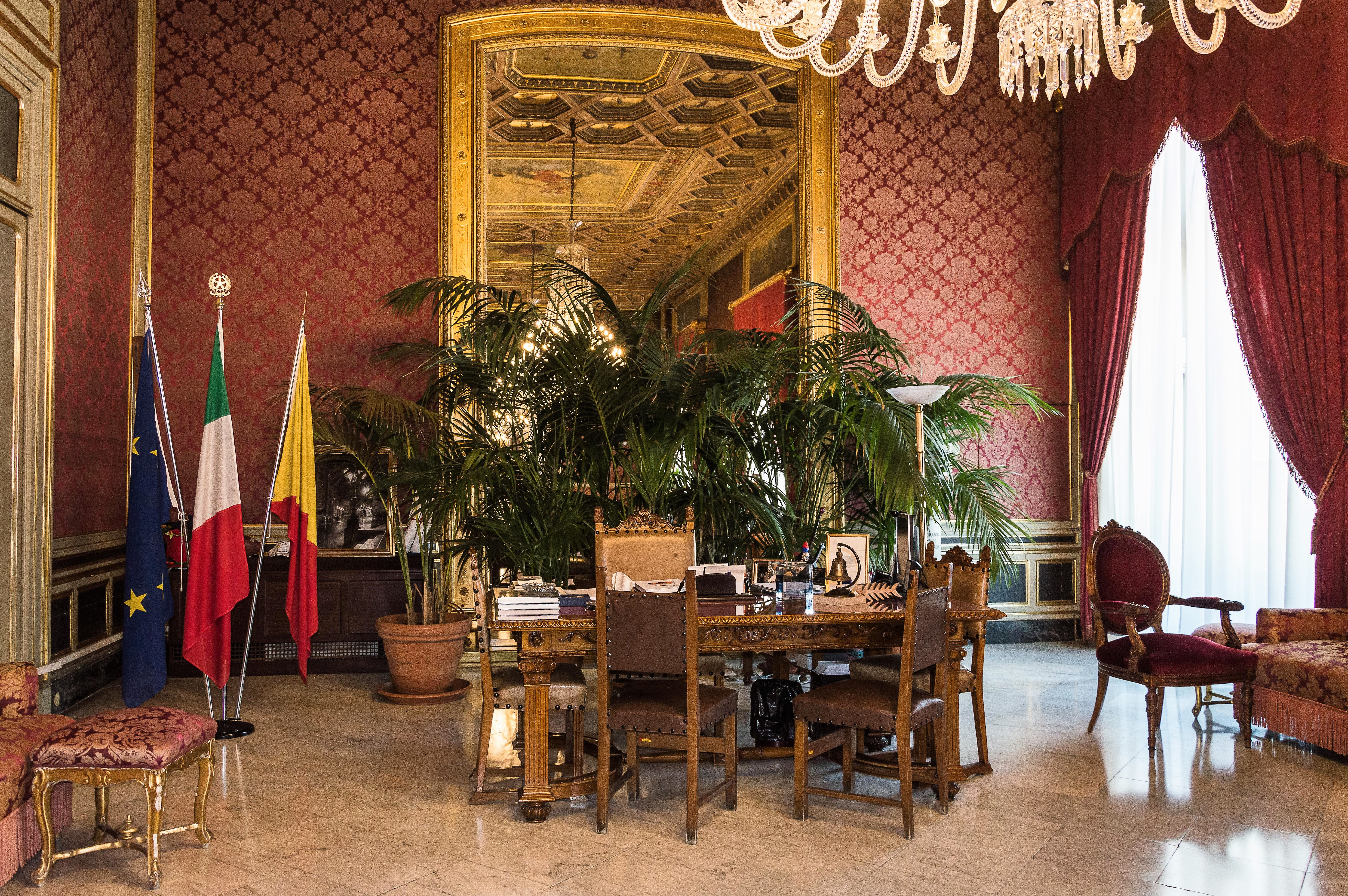 Palazzo delle Aquile This is a photo of a monument which is part of cultural heritage of Italy.